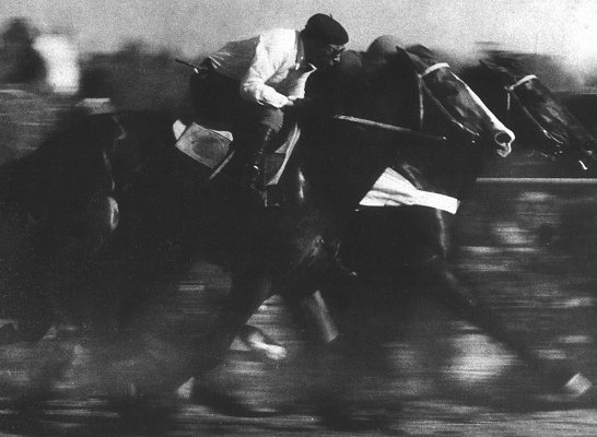 Fotografía del jinete uruguayo de hípica, Irineo Leguisamo.